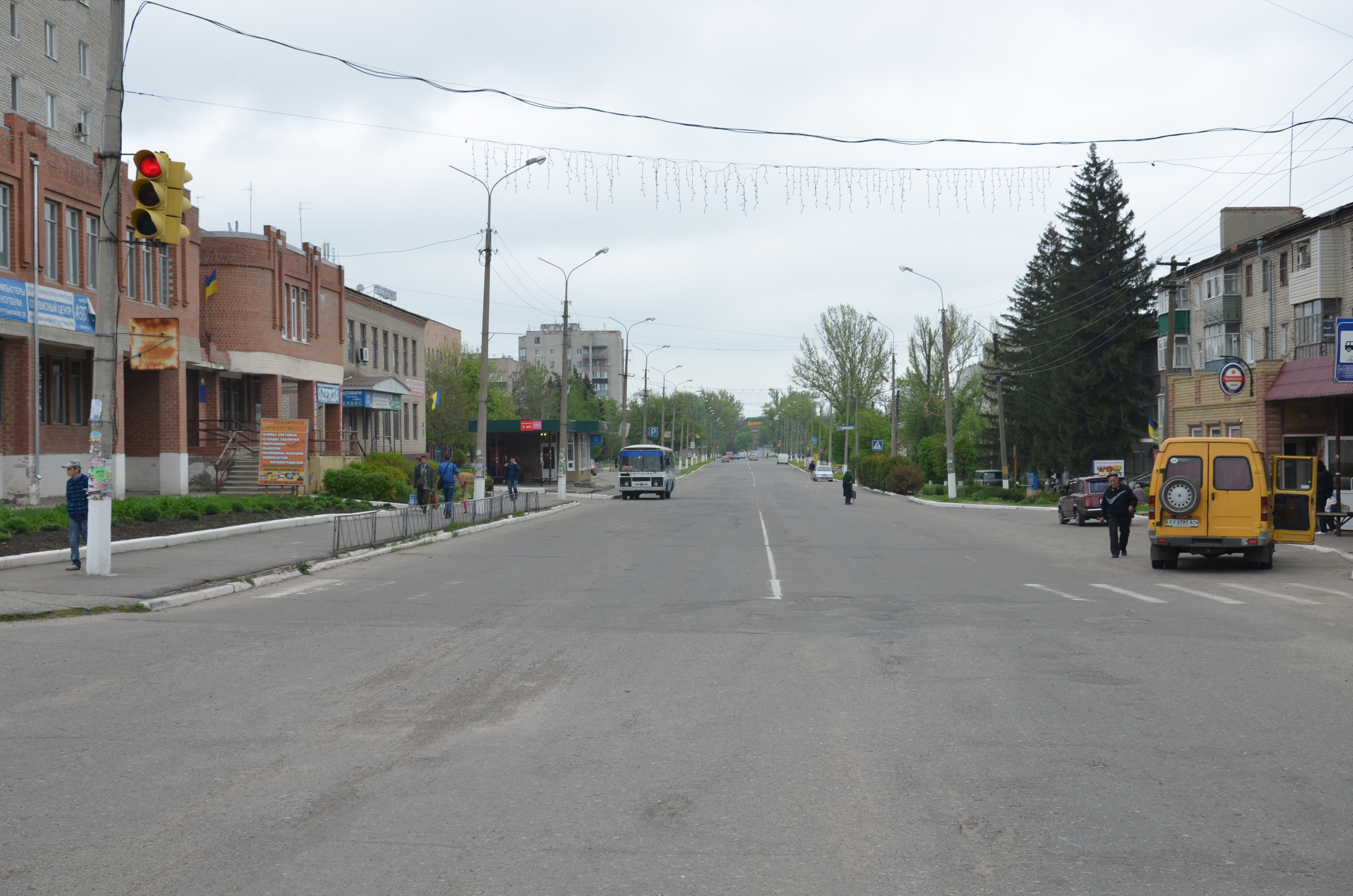 Октябрьская улица